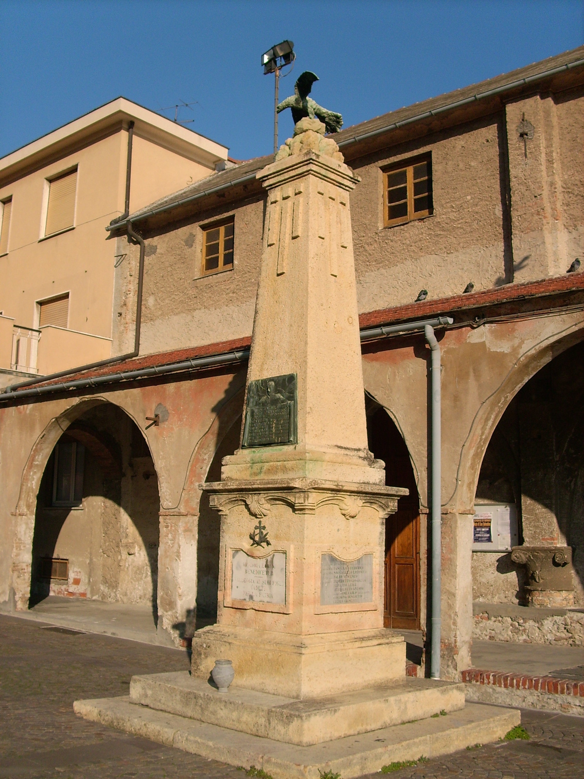 Monumento ai caduti presso la frazione di Valleggia (Quiliano), Liguria, Italy